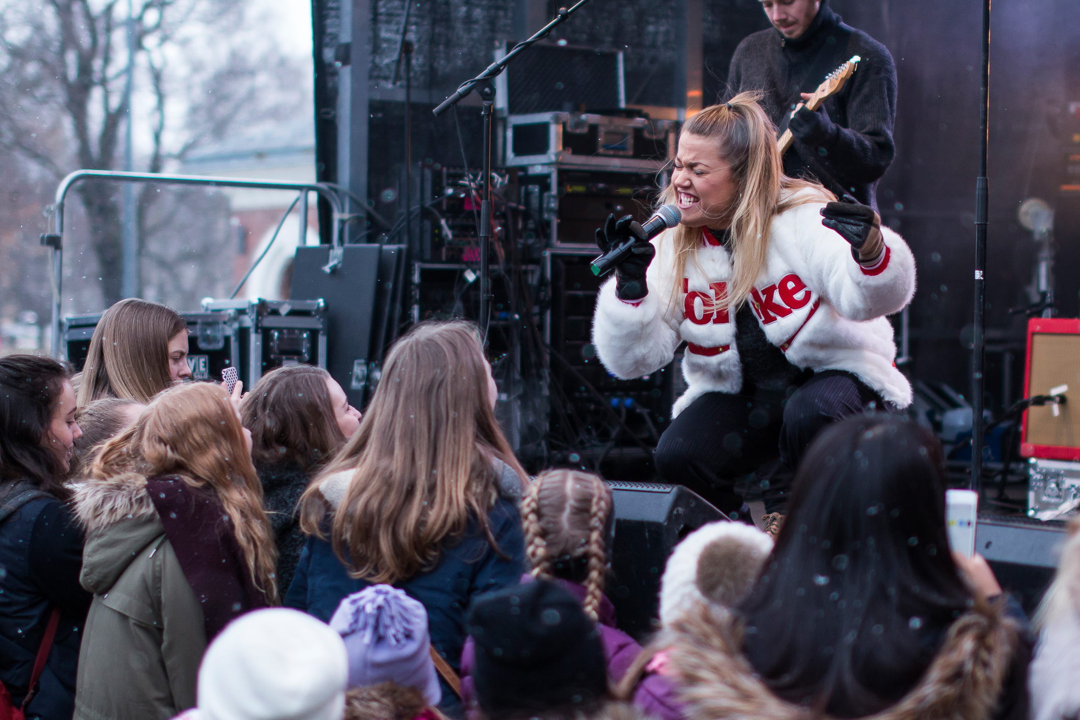 taken on: 2016.02.13 16:00 Photo: Vegar S Hansen / Lillehammer 2016